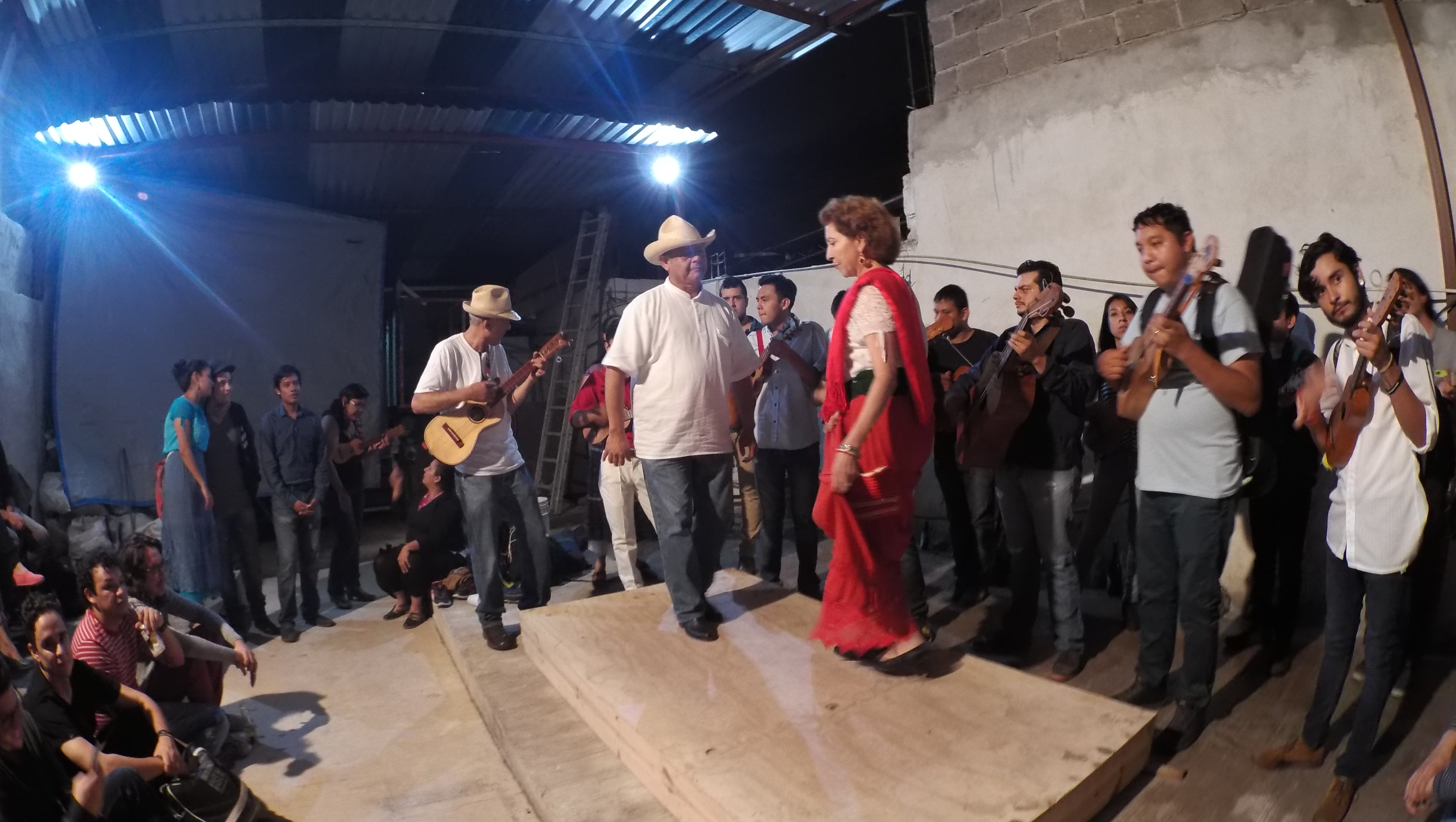 Fandango en Xalapa, Veracruz.